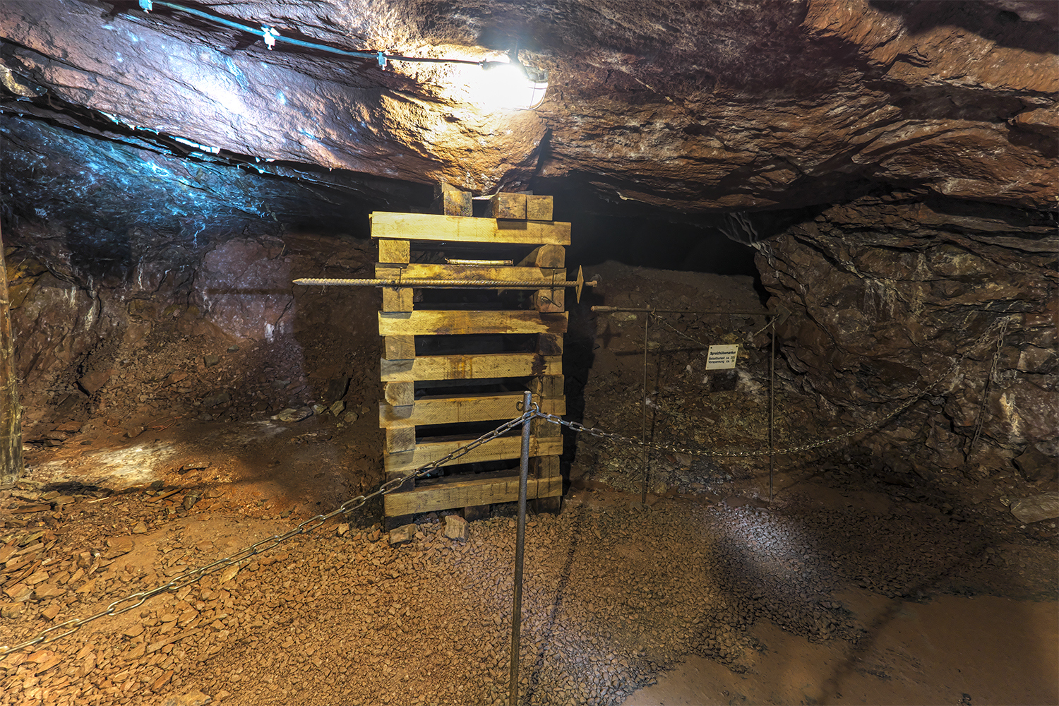 Stützendes Ausbau-Element aus Eichenholz auf der 150-m-Sohle des Besucherbergwerks Grube Fortuna